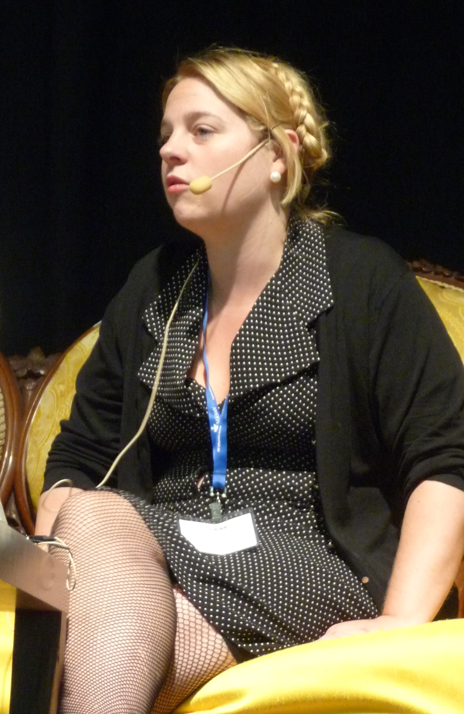 Isobel Hadley-Kamptz på bokmässan i Göteborg 2009.